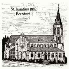 Betzdorf, kath. Kirche St. Ignatius, Zeichnung von 1882